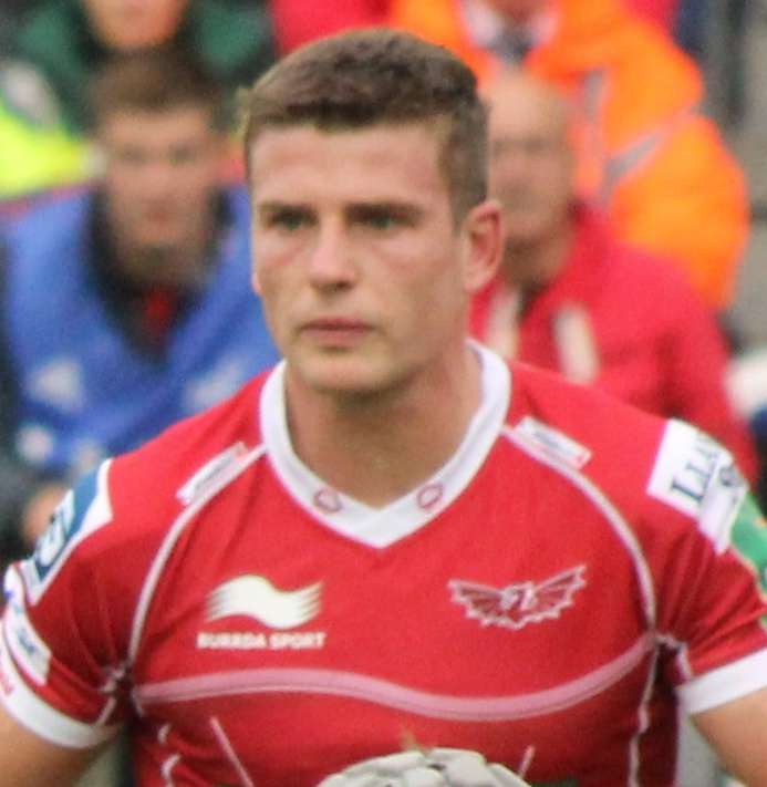 Matt Hopper Heineken Cup 2013-14, 12 October 2013, Twickenham Stoop. Match between: Harlequins - Scarlets